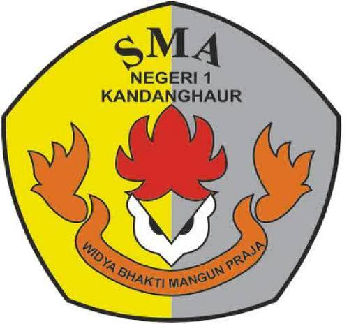 Logo SMA Negeri 1 Kandanghaur, Kabupaten Indramayu, Jawa Barat